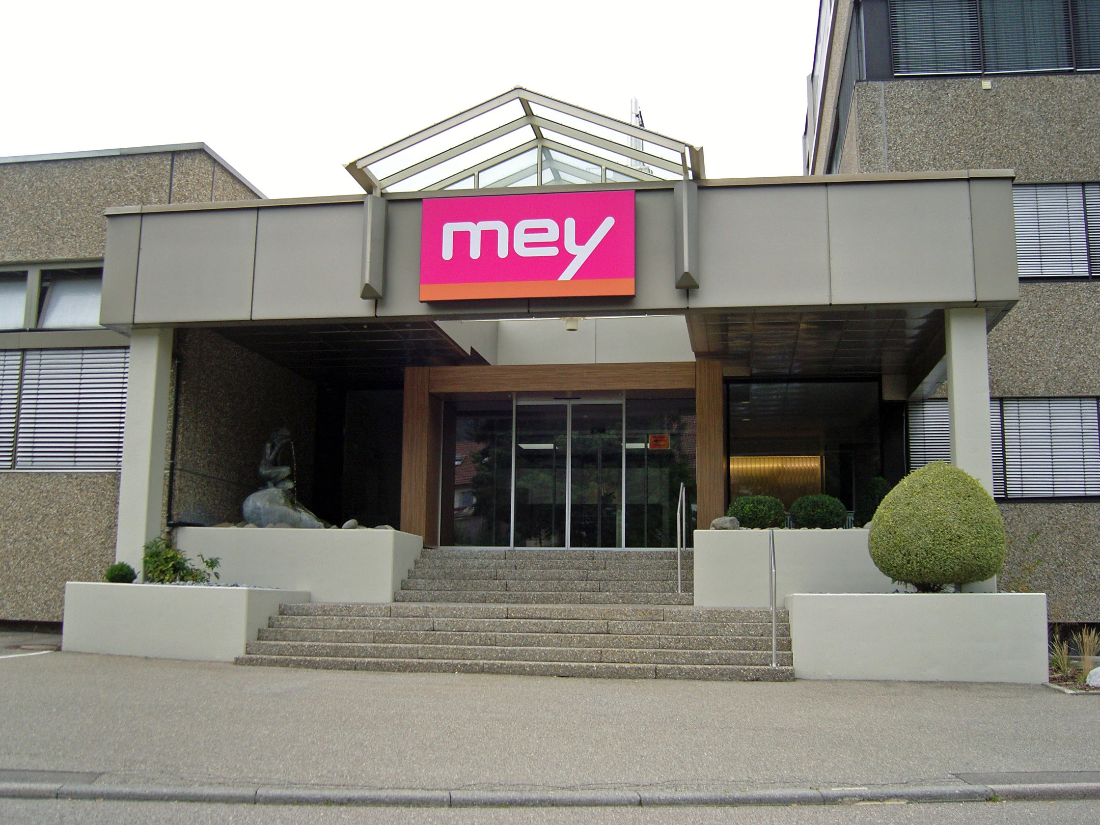 Mey Haupteingang Verwaltung